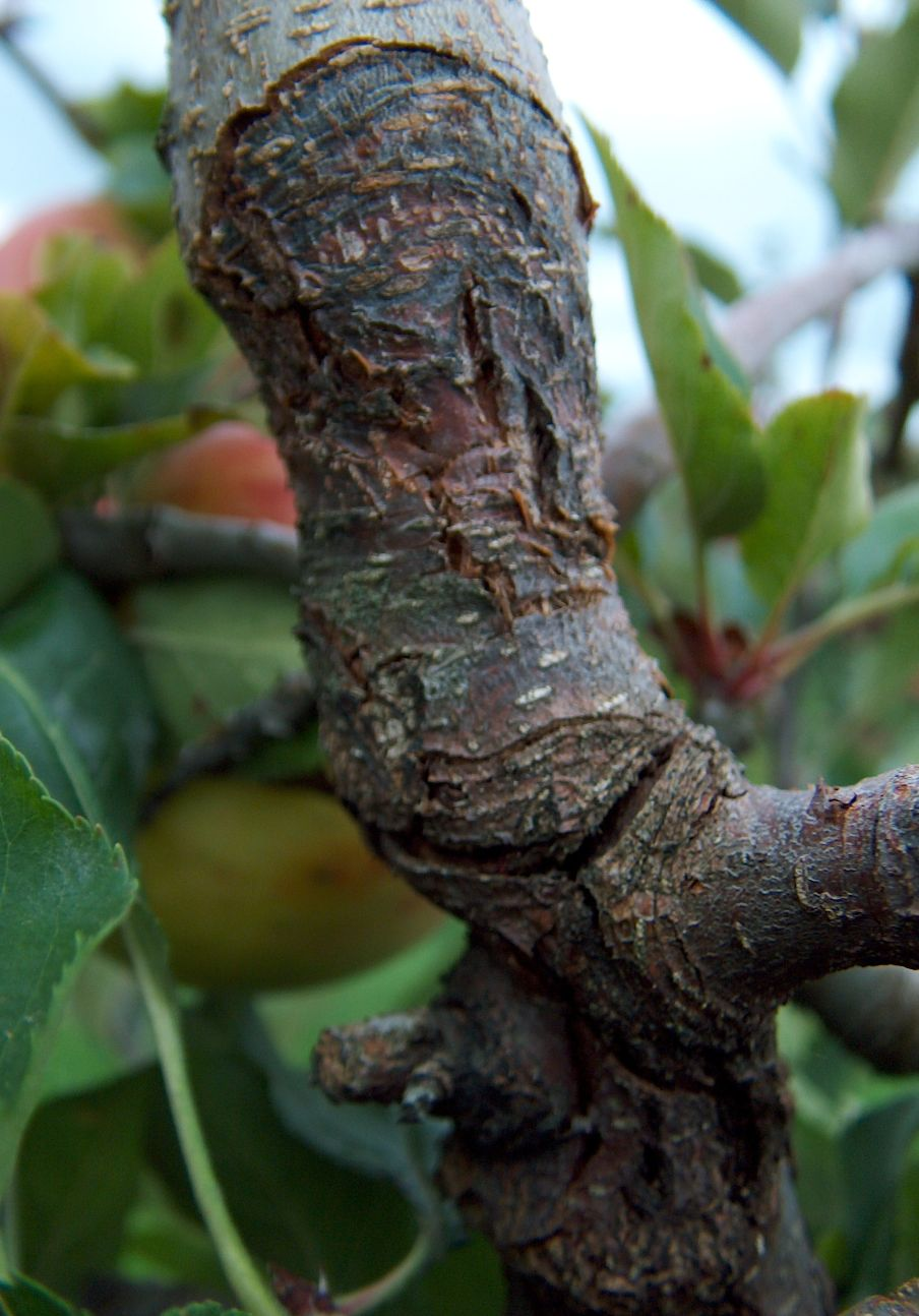 Baumkrebs (Nectria galligena) am Stamm eines Obstbaumes